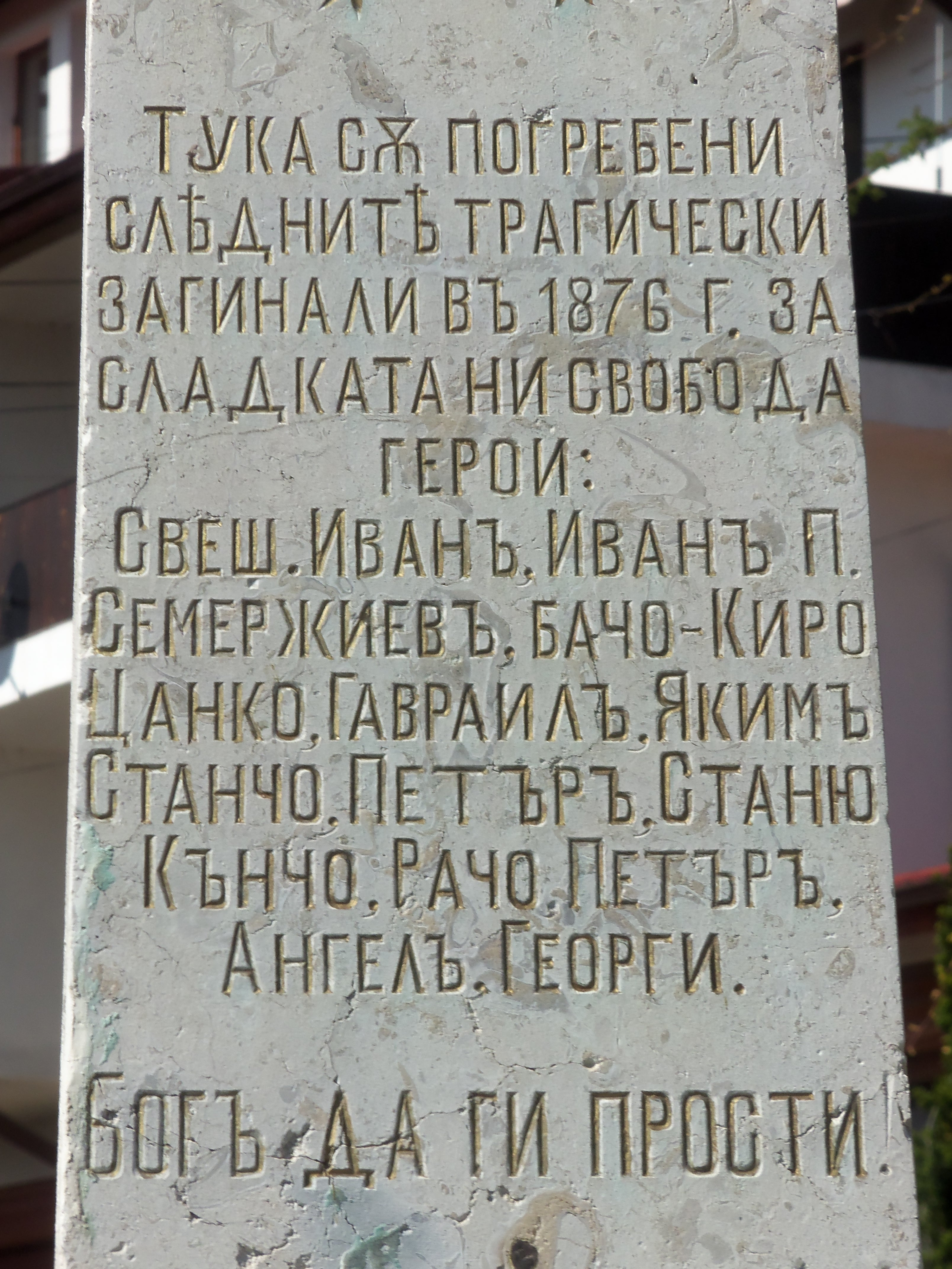 Надпис на паметника на загиналите за освобождението от османско владичество (Иван Семерджиев, Бачо Киро и др.), квартал "Варуша север", Велико Търново